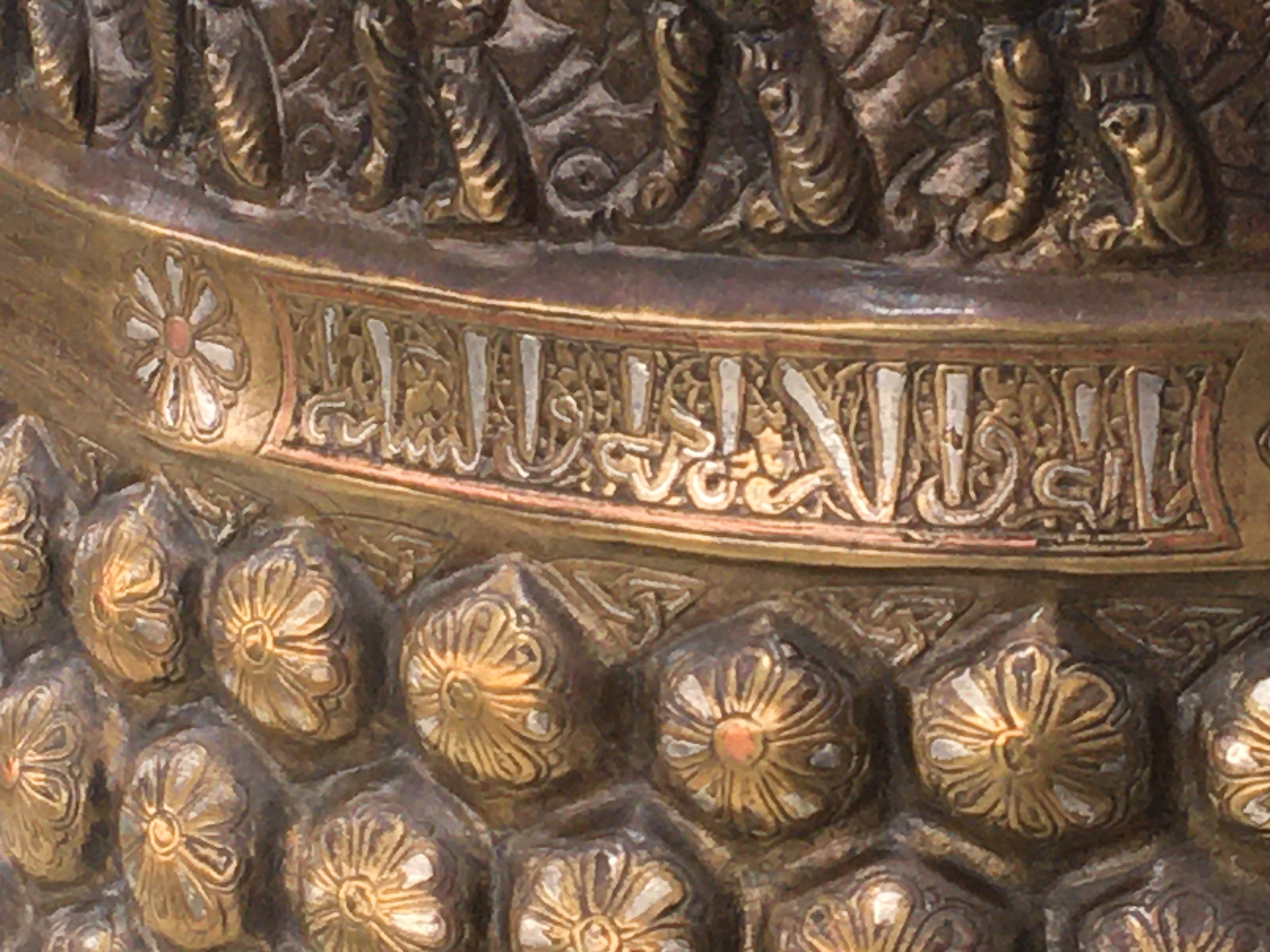 Cartouche en écriture cursive sous les bandeau des lions